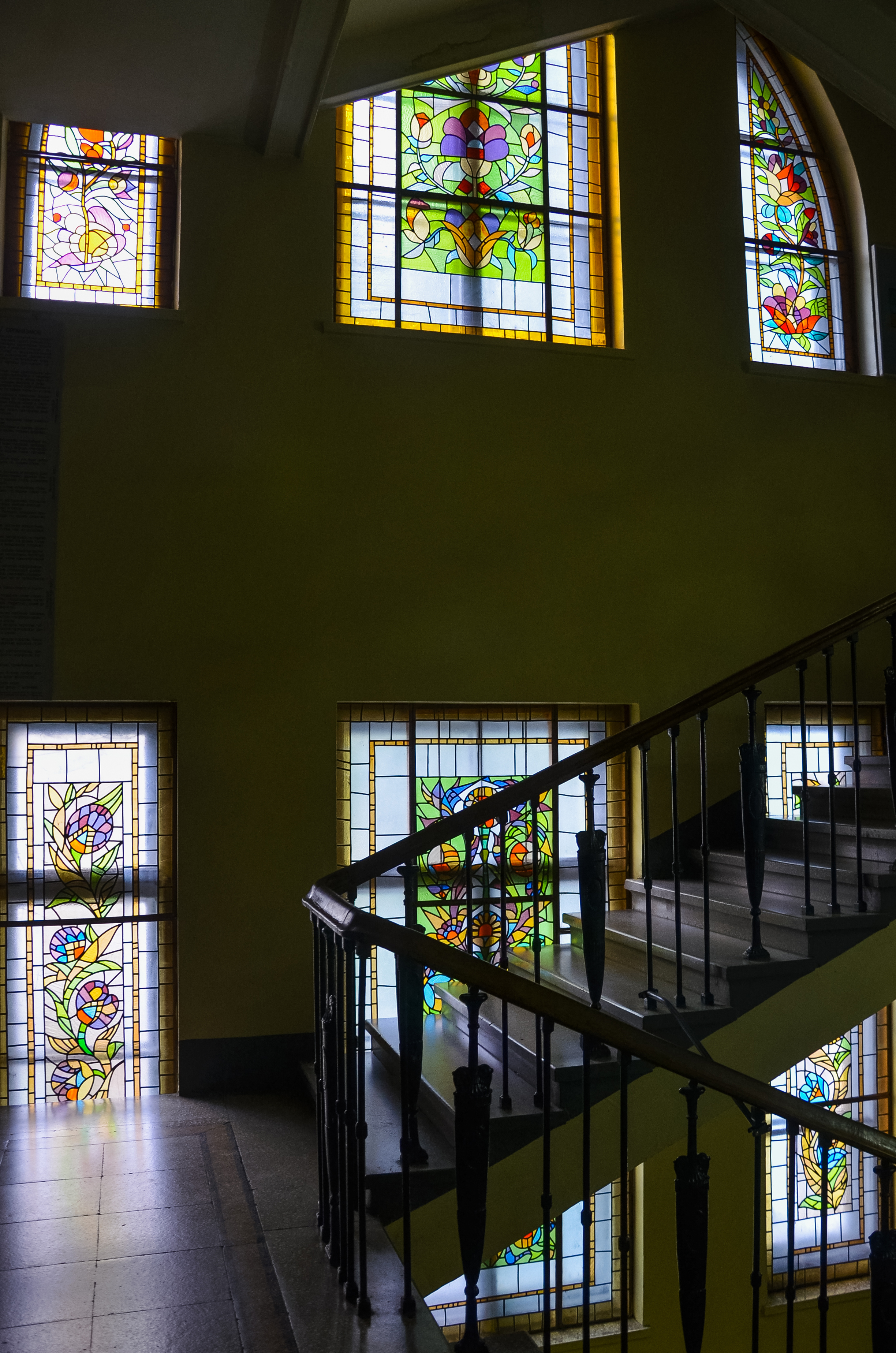 Київ, вулиця Б. Хмельницького, 13-15/55. На фото -вітражі Національного науково-природничого музею НАН України, пам'ятки архітектури 1914–1927.